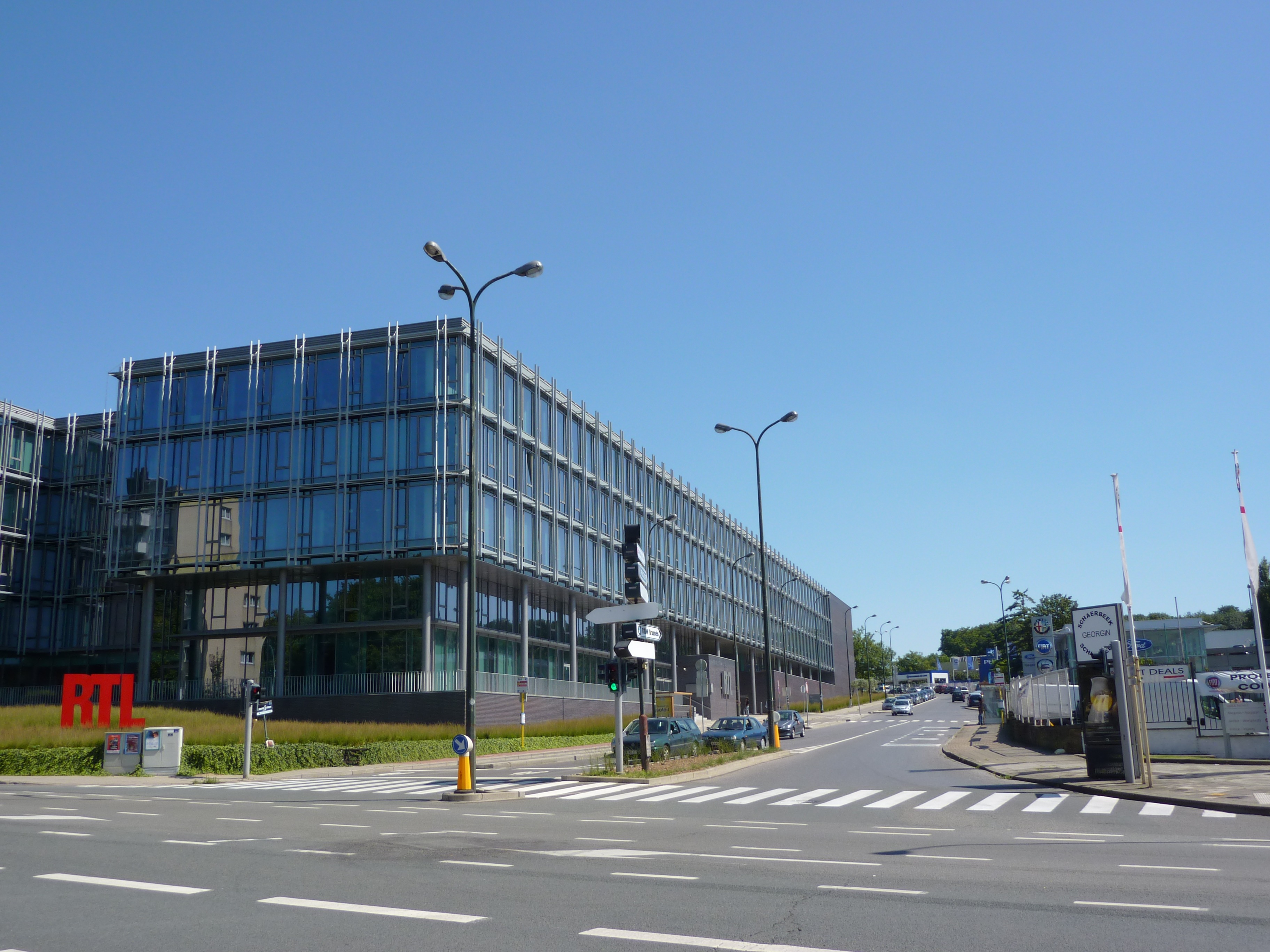 L'avenue Jacques Georgin à Schaerbeek, Bruxelles, Belgique.